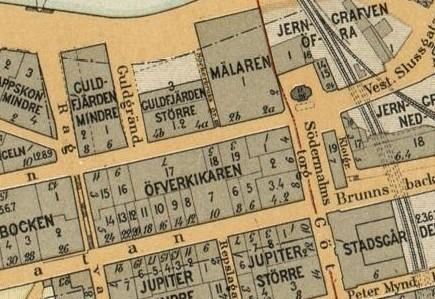 Del av Alfred Bentzers karte över Stockholm med kvarteren Guldfjärden, Mälaren och Överkikaren